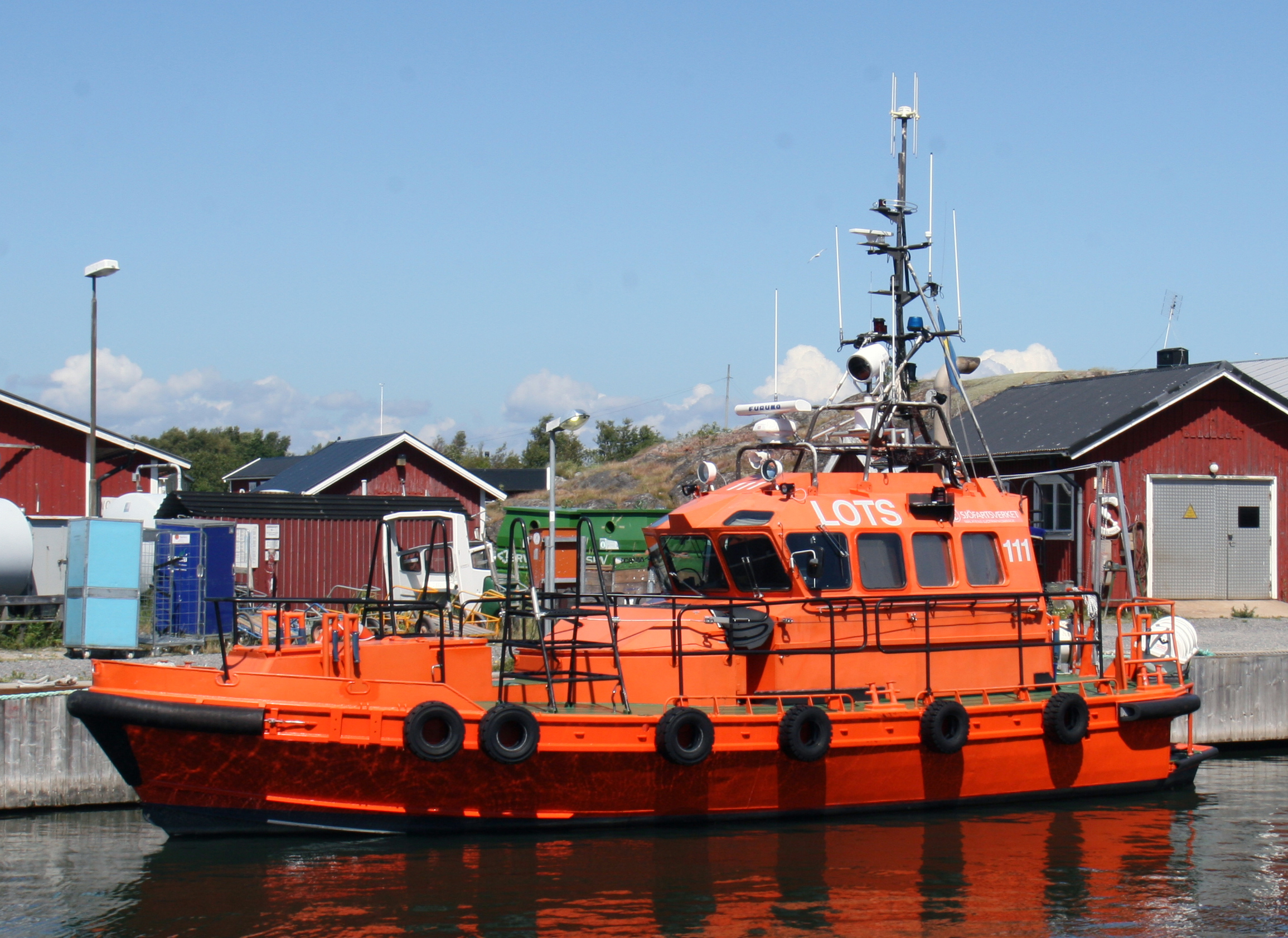 Pilot 111 SE på Landsort 17 juli 2009